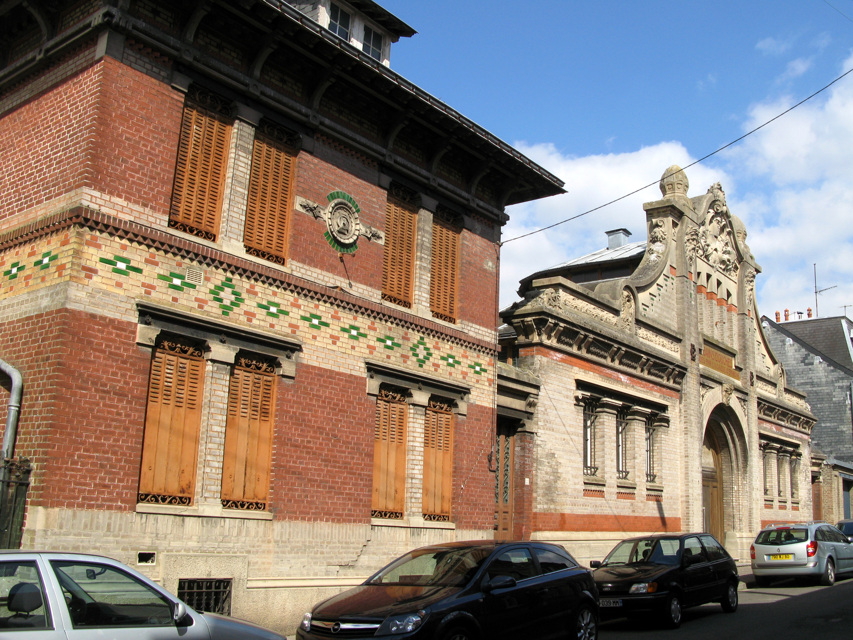 Abbeville (Somme, France) - Les bains-douches.